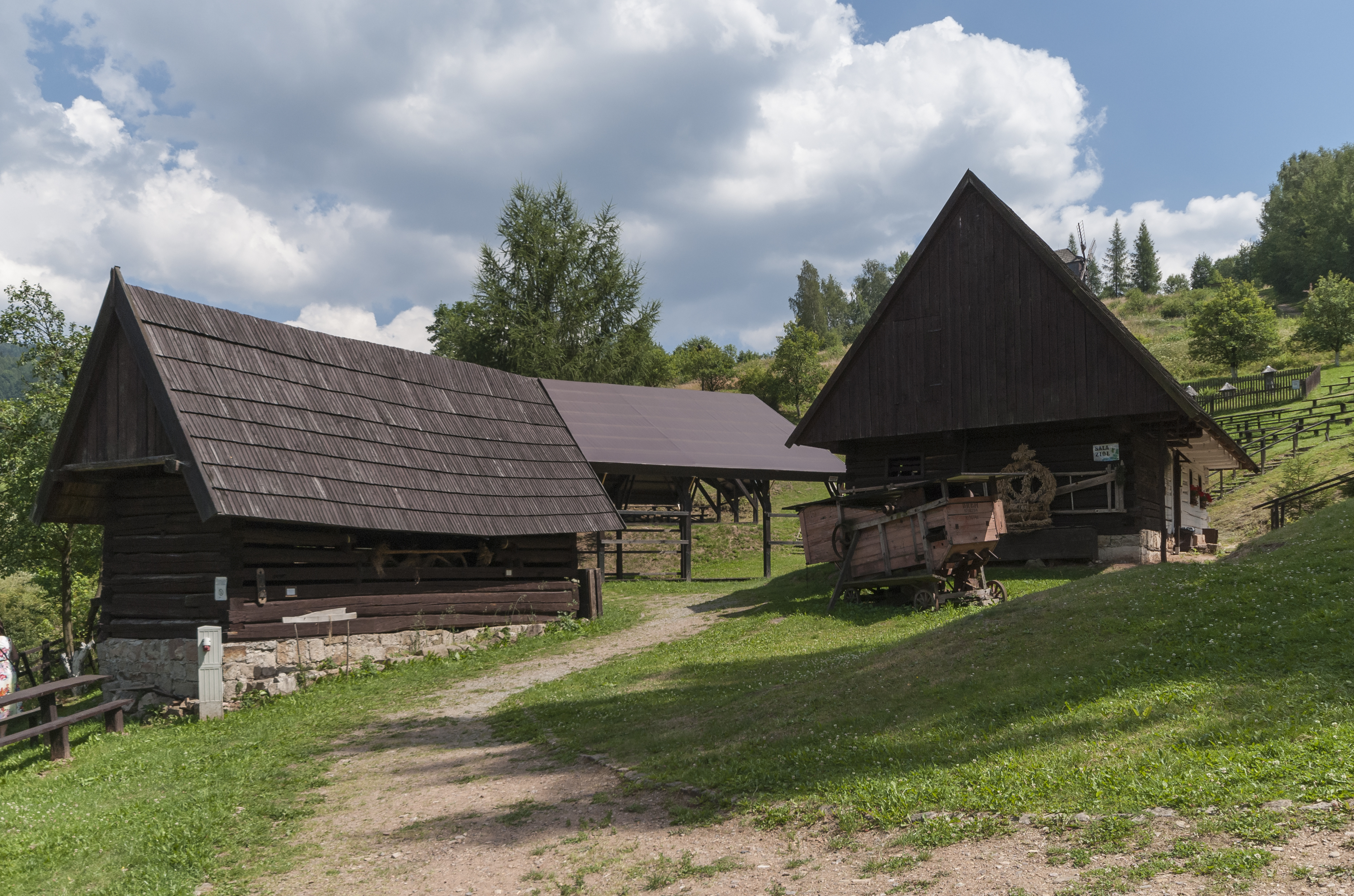 Kudowa-Zdrój - Pstrążna, wieś - układ przestrzenny, XVIII, XX